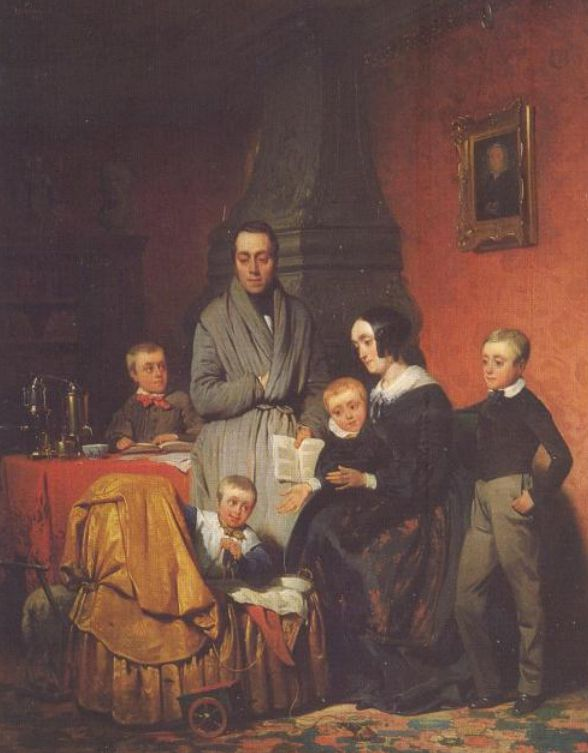 Familieportret van Kipps door W.H. Schmidt